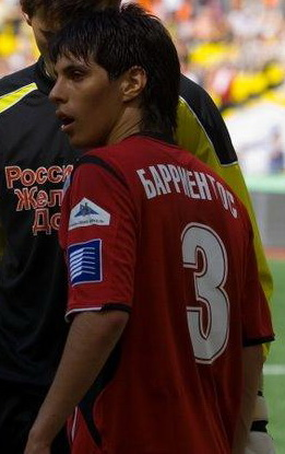 Pablo Cesar Barrientos